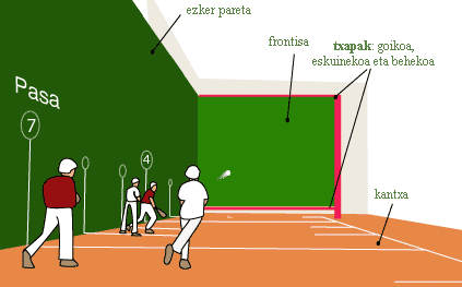 Frantsesez eginda zegoen irudi hau eta neronek euskararatu egin dut.